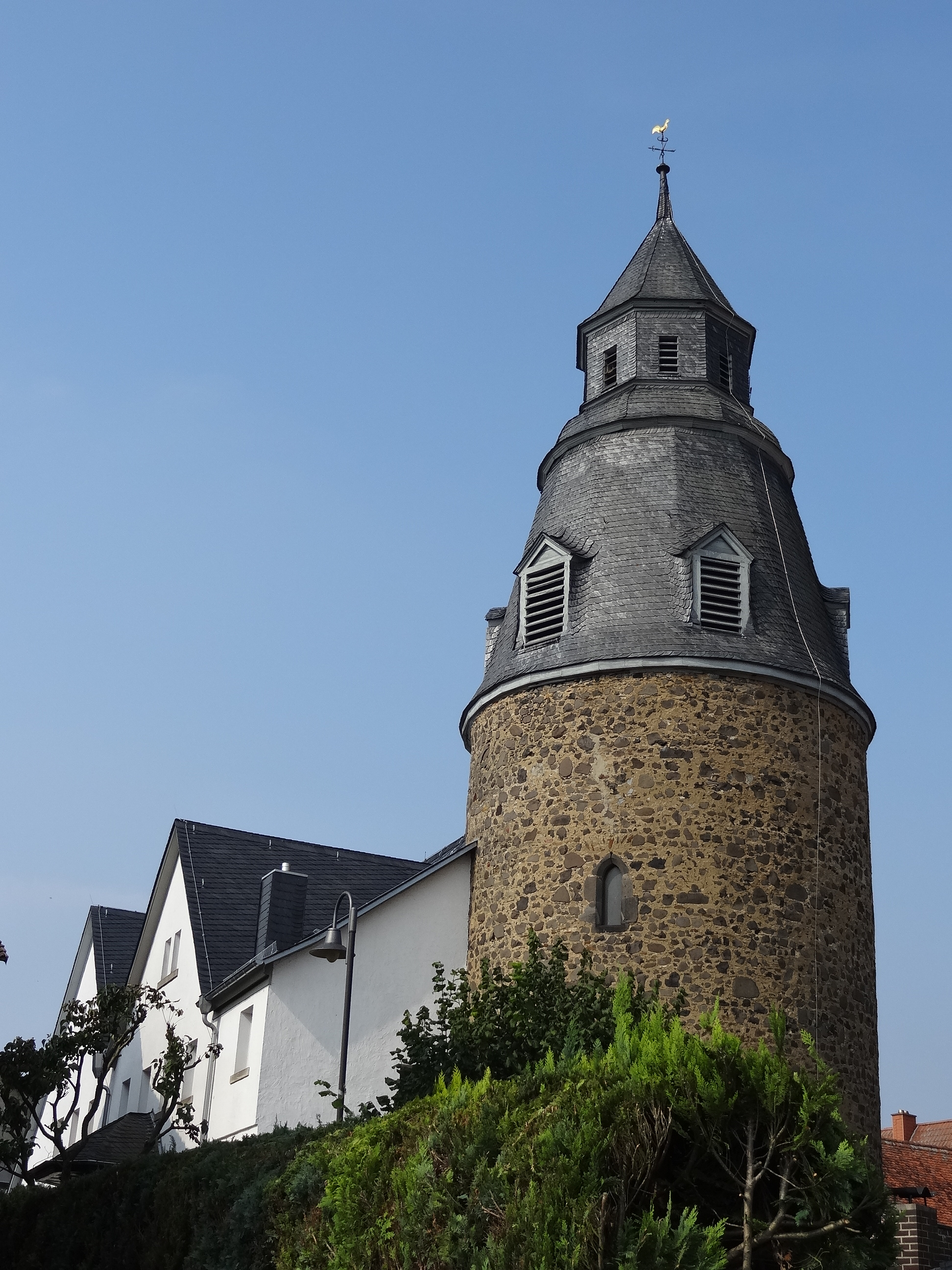 Evangelische Pfarrkirche (Griedel)